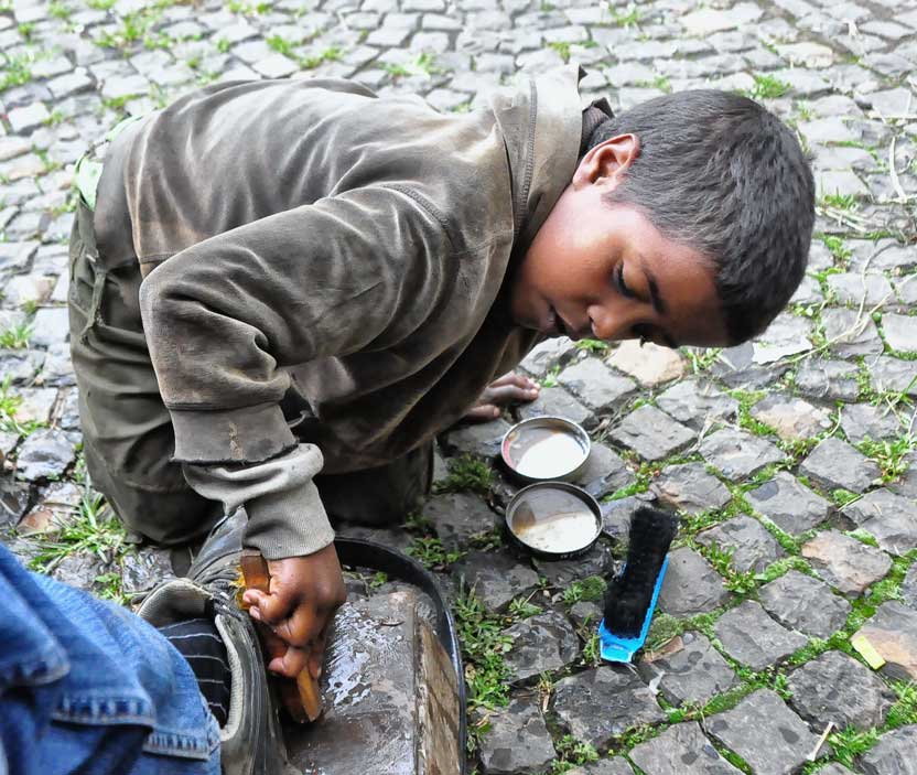 Gondar